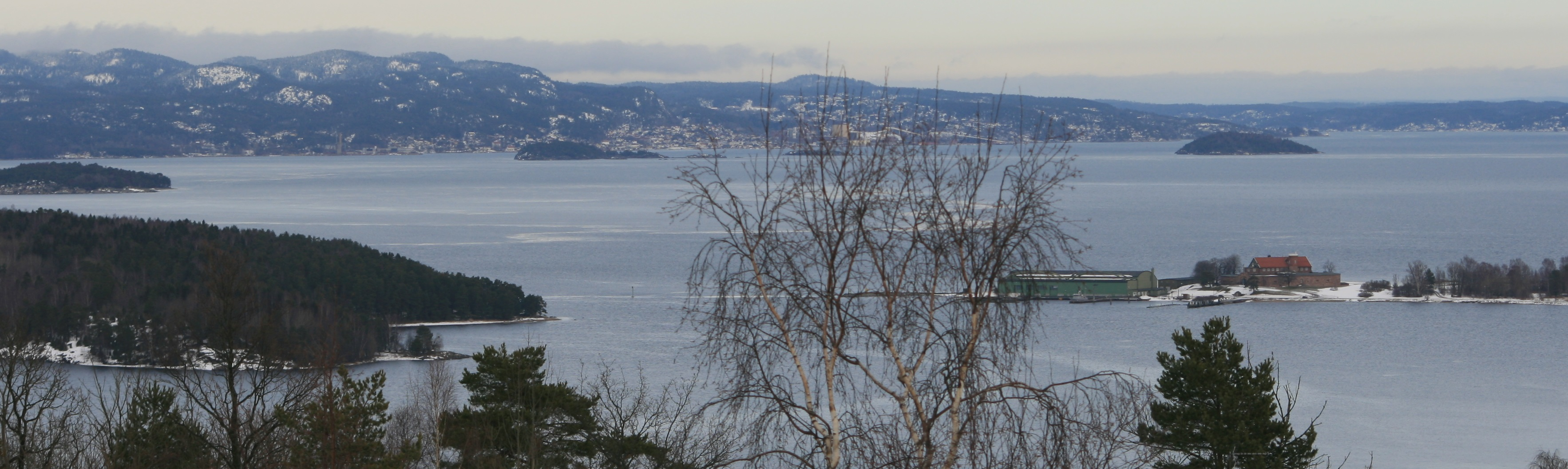 Østøya til venstre, og Vealøs til høyre på bildet.